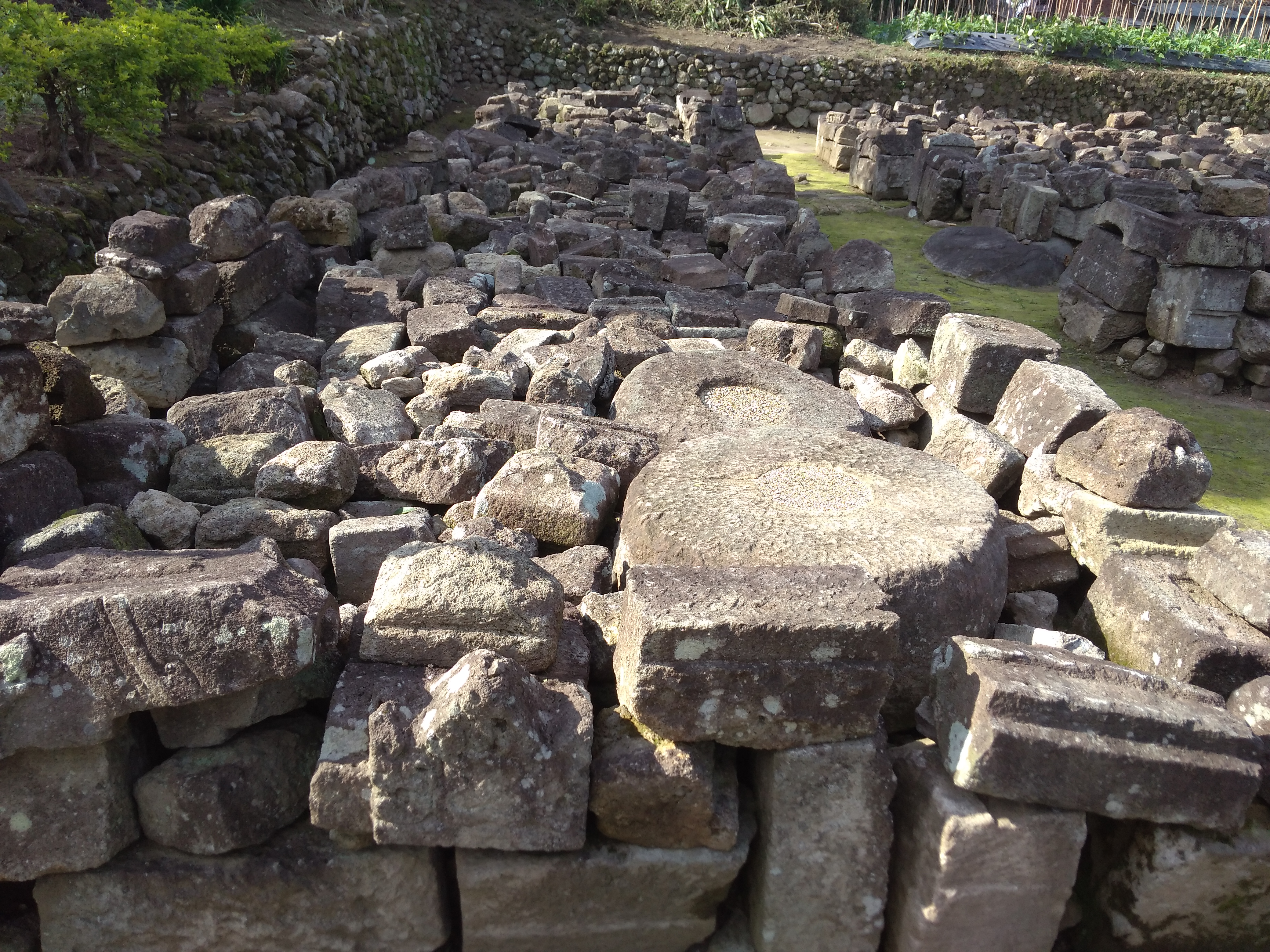 Reruntuhan candi di Situs Gondosuli